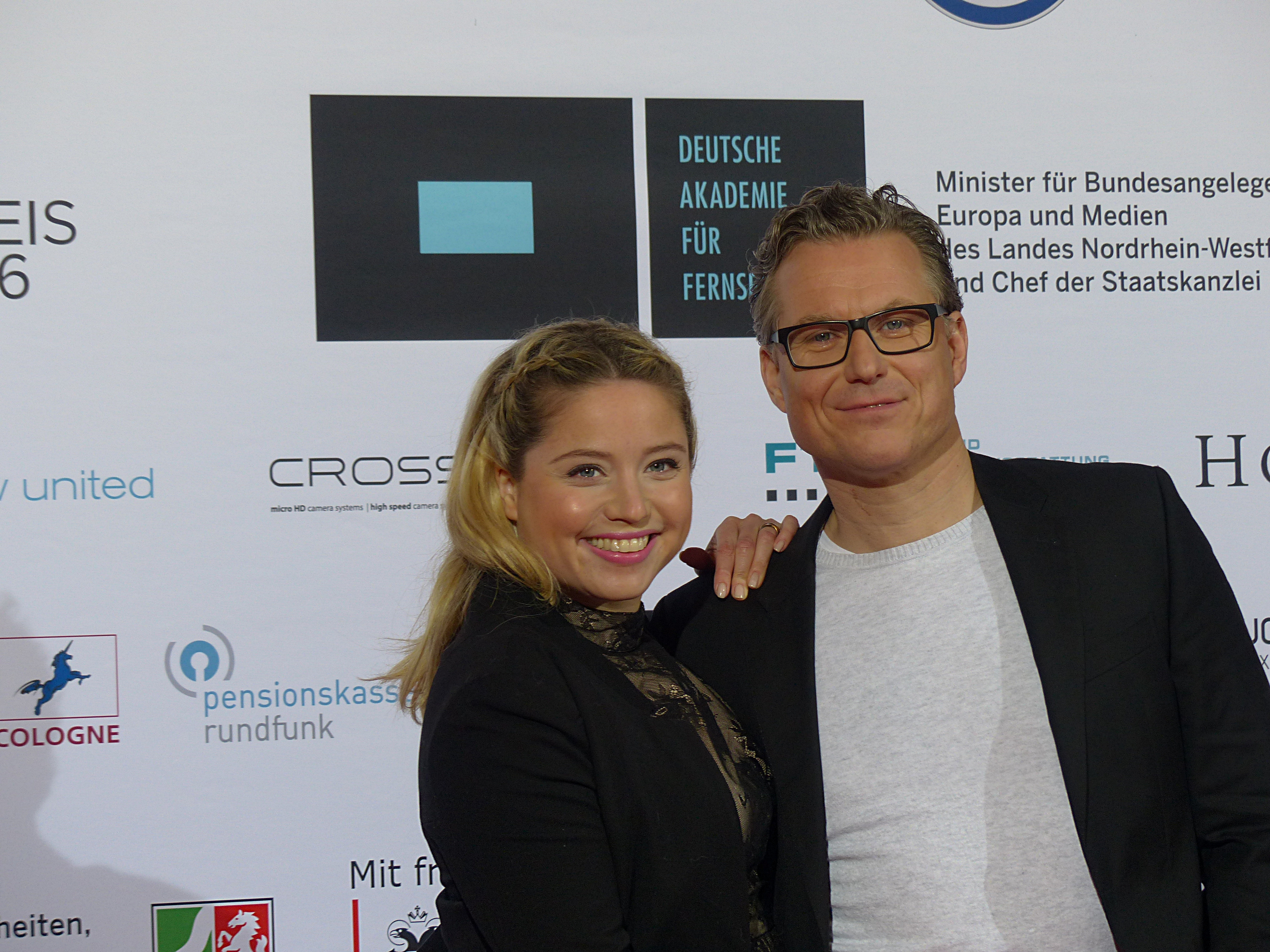 Caroline Maria Frier und Dirk Borchardt bei der Verleihung zur Auszeichnung 2015, durch die Deutsche Akademie für Fernsehen, im November 2015.